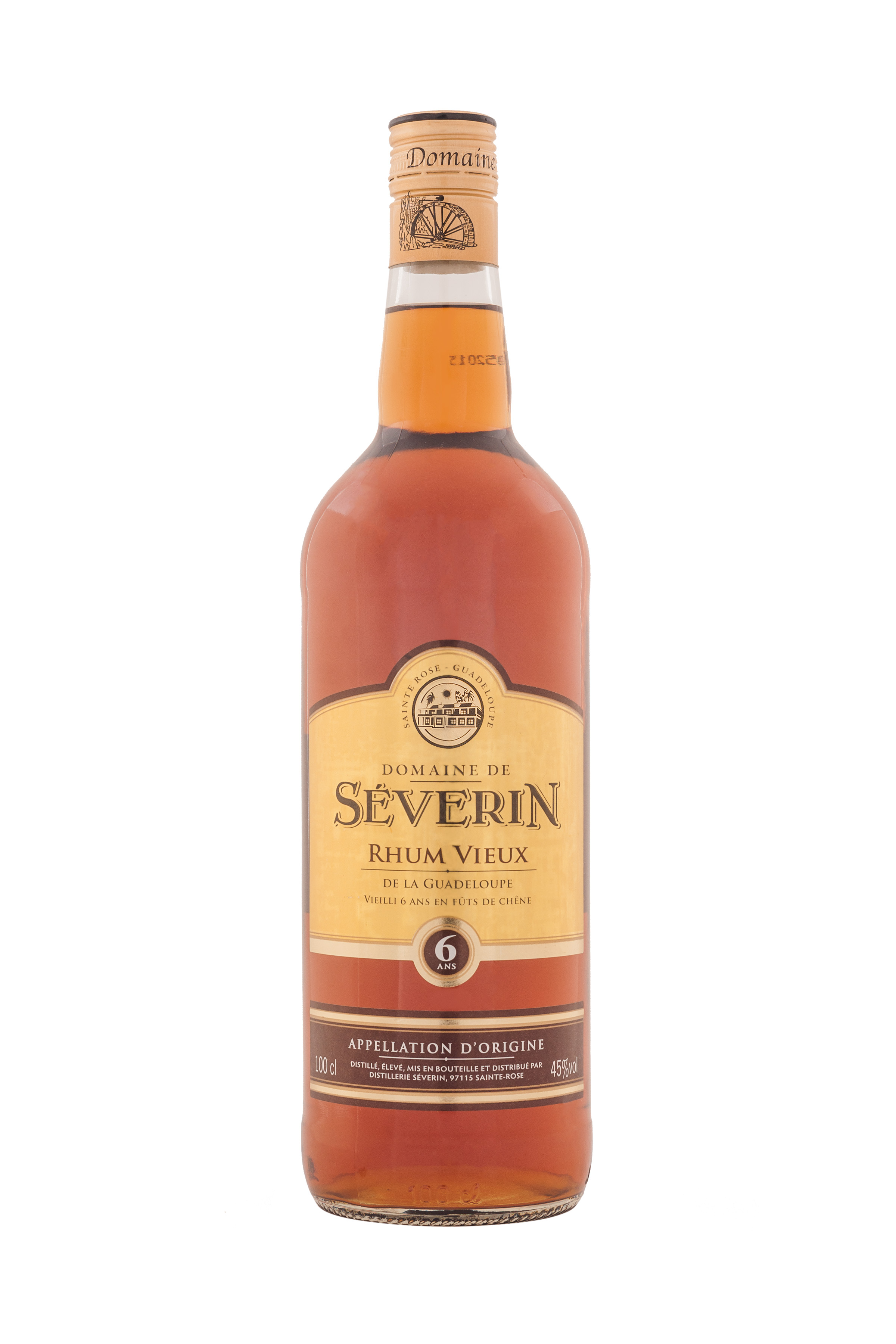 Produit de la Distillerie Séverin, Sainte-Rose, GUADELOUPE, F.W.I. Rhum agricole vieilli 6 ans en fûts de chêne ayant contenu de bourbon.